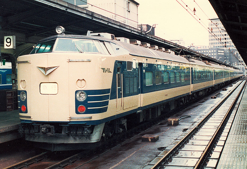 国鉄 583系特急形電車 急行「立山」 （回送）